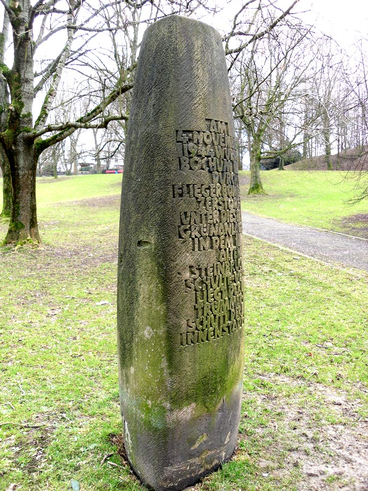 Bochum-Altenbochum. Das Denkwürdige Zeichen auf dem grünen Grundstück zwischen Velsstraße und Wasserstraße.